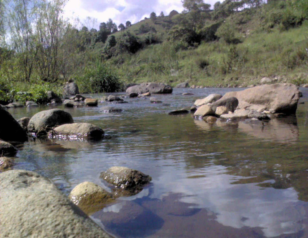 Río Sumpul. Las Pilas, Chalatenango. El Salvador